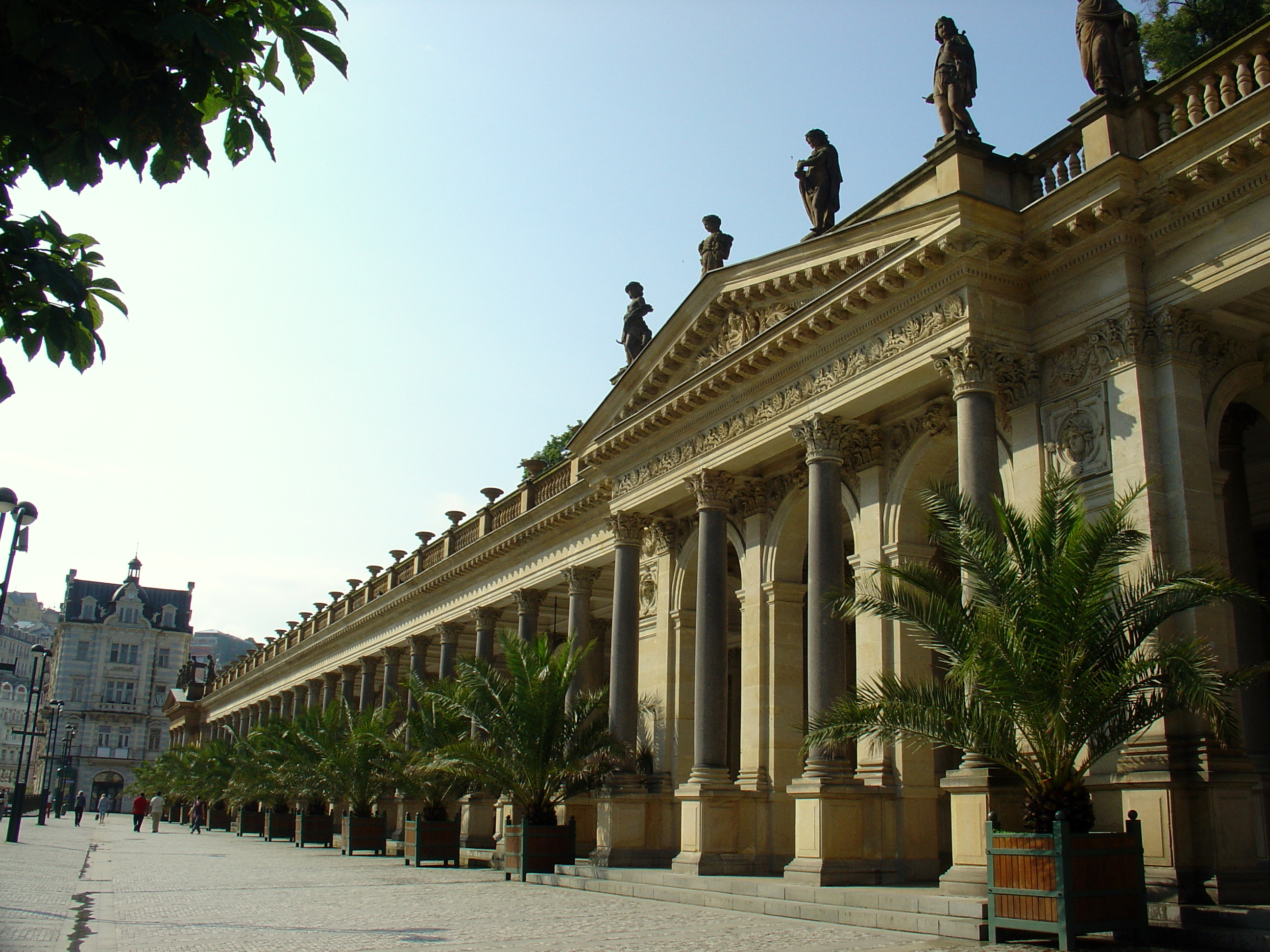 Mlýnská kolonáda, Karlovy Vary, république Tchèque